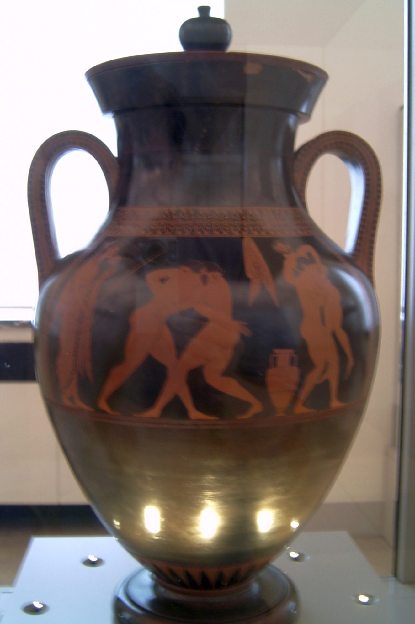 Amphora vom Töpfer Andokides signiert, um 525 v. Chr., in Vulci gefunden